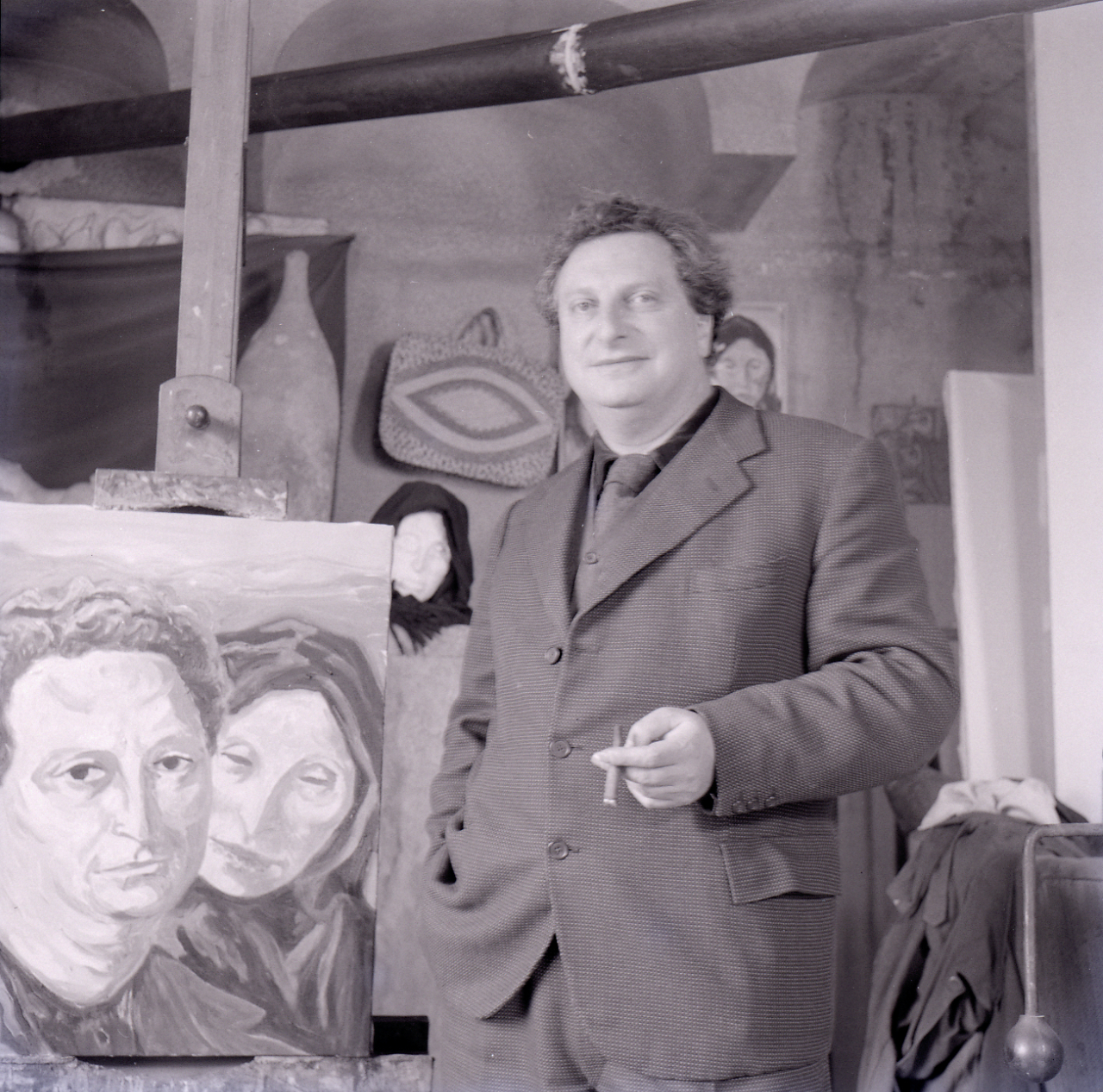 Servizio fotografico : Italia, 1982 / Paolo Monti. - Buste: 6, Fototipi: 6 : Negativo b/n, gelatina bromuro d'argento/ pellicola ; 6x6. - ((Serie costituita da6 buste di carta, tenute insieme da graffetta, identificate con i nn.: R4373, R4374, R4375, R4376, R4377, R4778. - Sulla busta 4773: "Levi". - Insieme a questa serie, a comporne una pù grande, vi è un'altra busta, contenente 4 negativi, catalogata come altra serie e riferita ai numeri R4379/82. - Fonte: Rubrica di Paolo Monti: Archivio 10x12 (ultimi numerati) - dal G1 al (s.d.), presso Archivio Paolo Monti